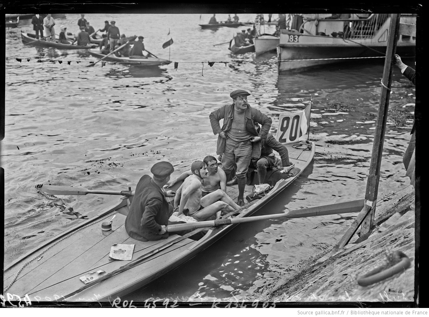 billington et estrade apres l'arrivée de la traversee de paris